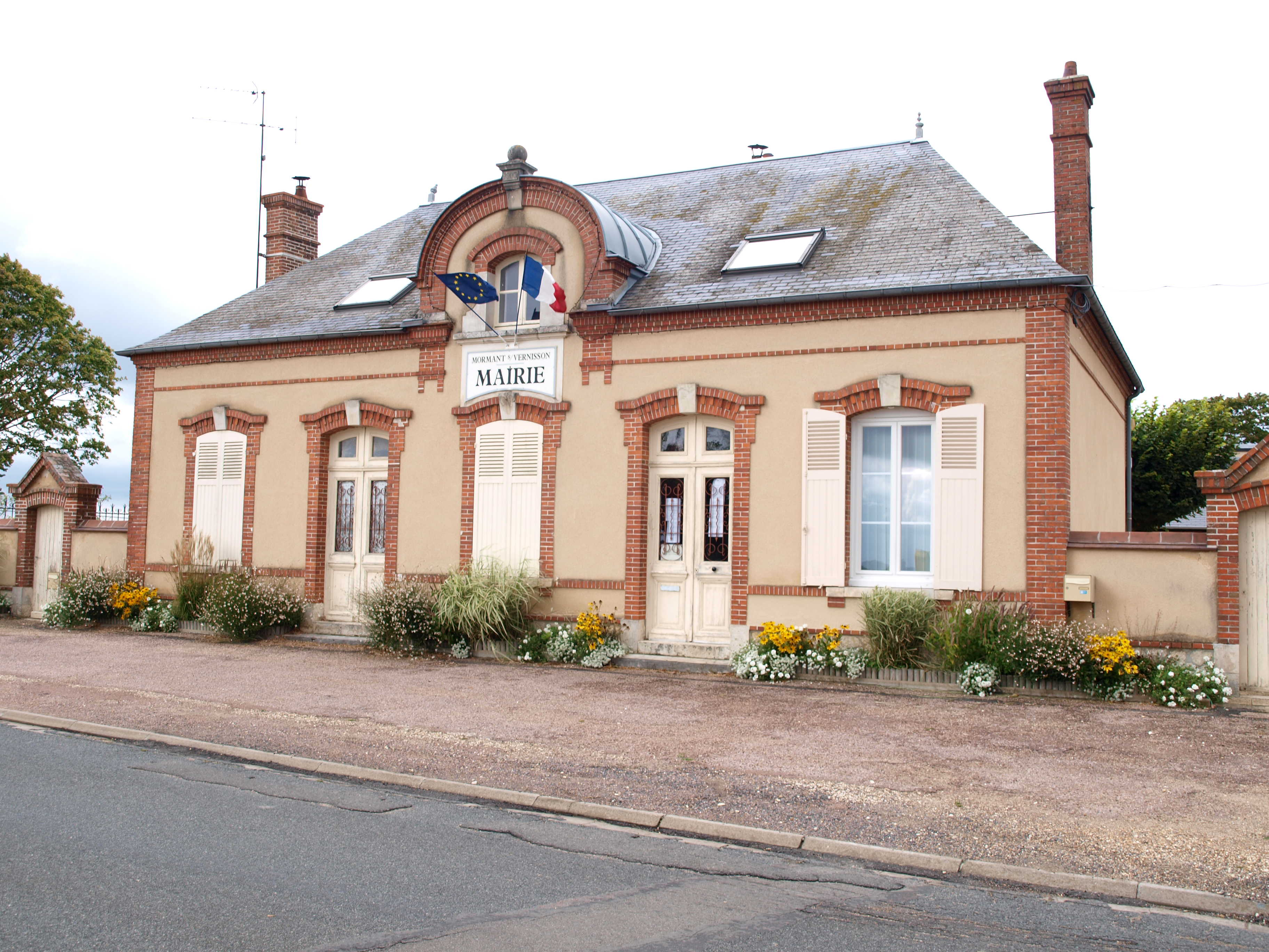 Mormant-sur-Vernisson (Loiret, France) ; la mairie.